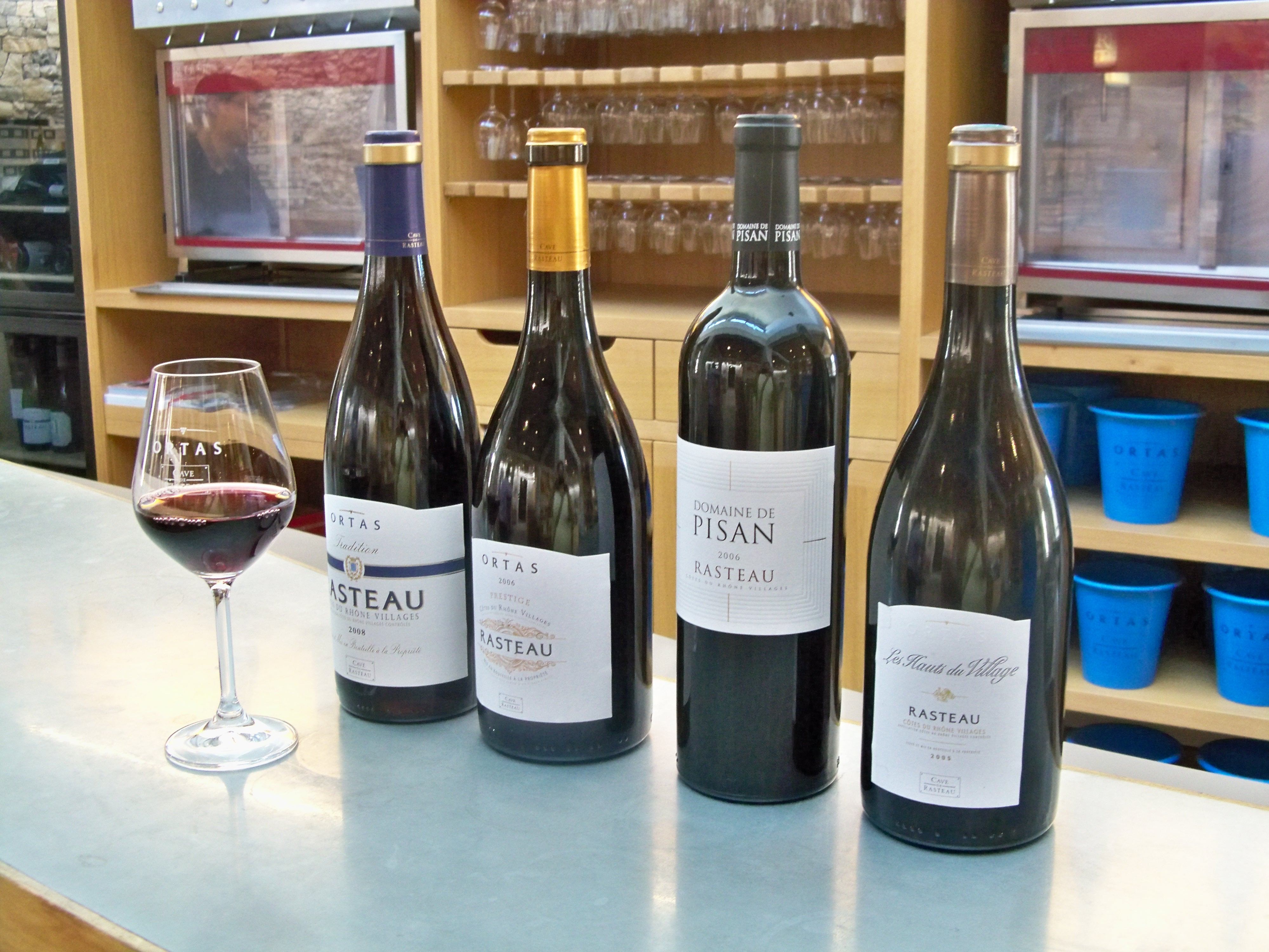 Bouteilles d'AOC Rasteau rouge, Vaucluse, France